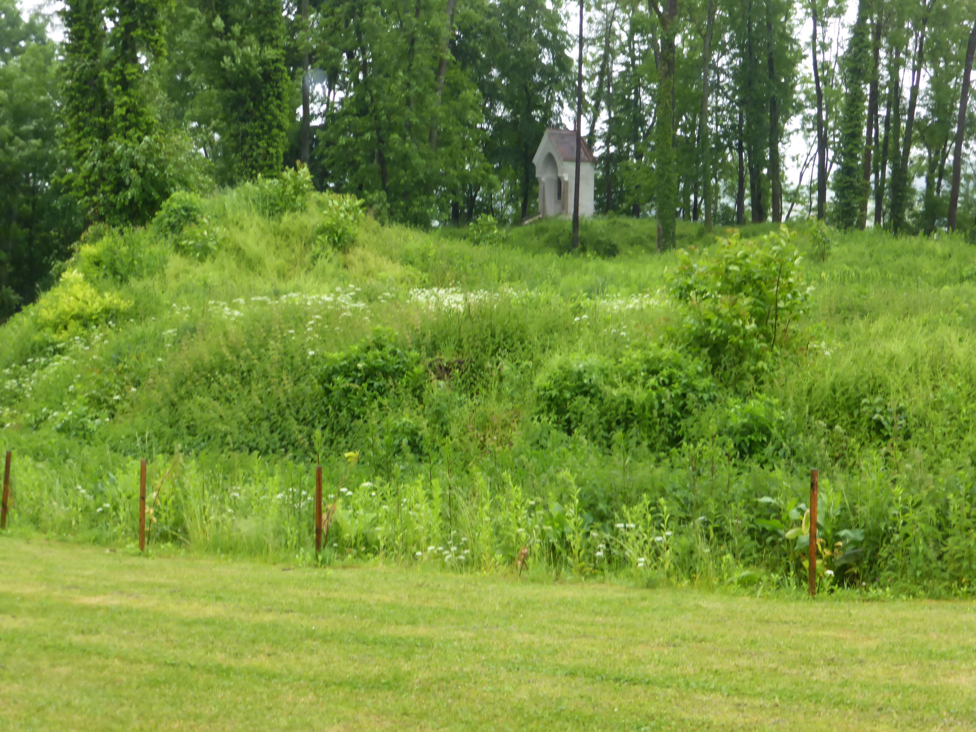 Lagestelle der Burg Volkensdorf